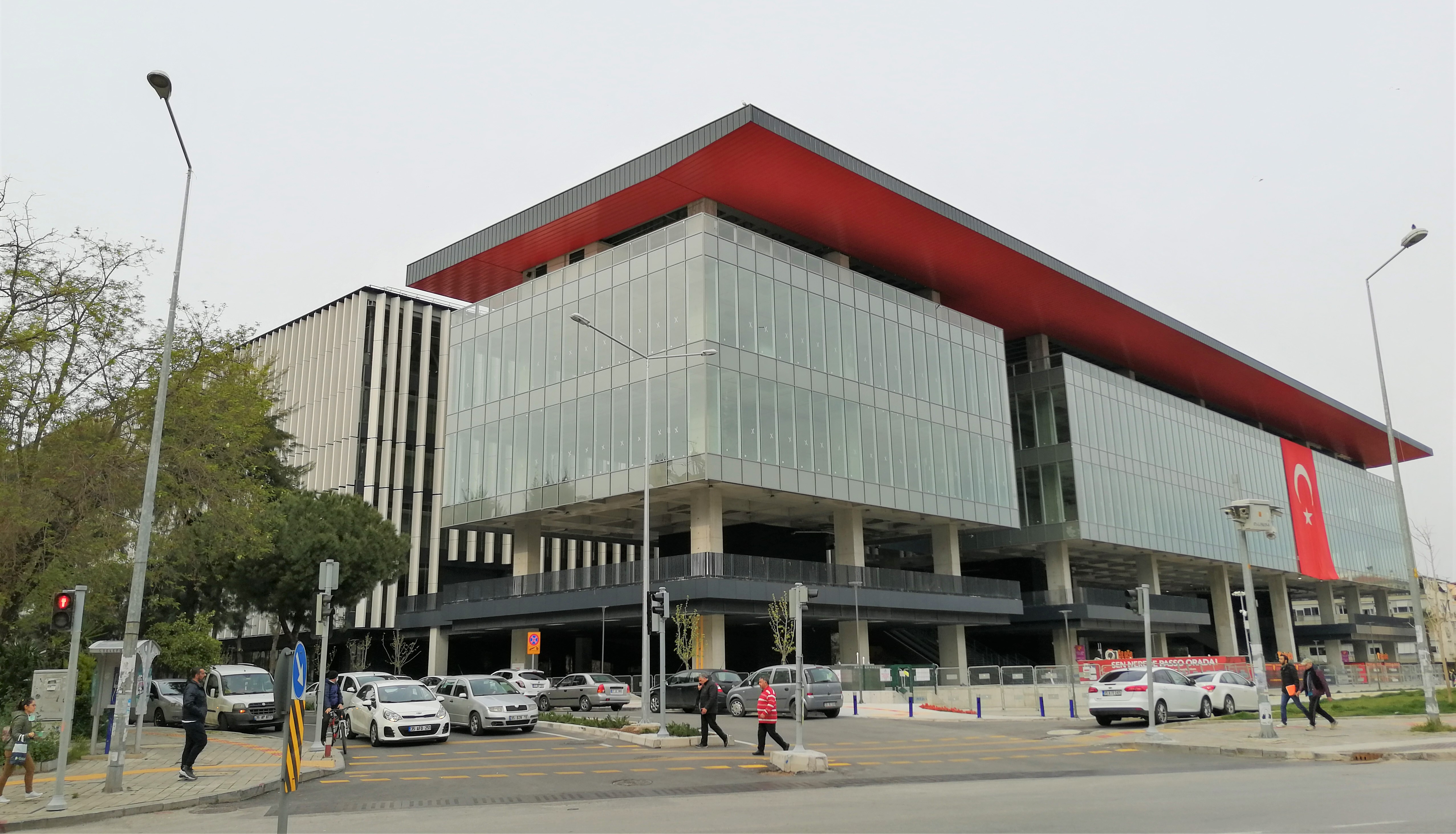 Gürsel Aksel Spor ve Sağlıklı Yaşam Merkezi, Göztepe Stadyumu, 2020